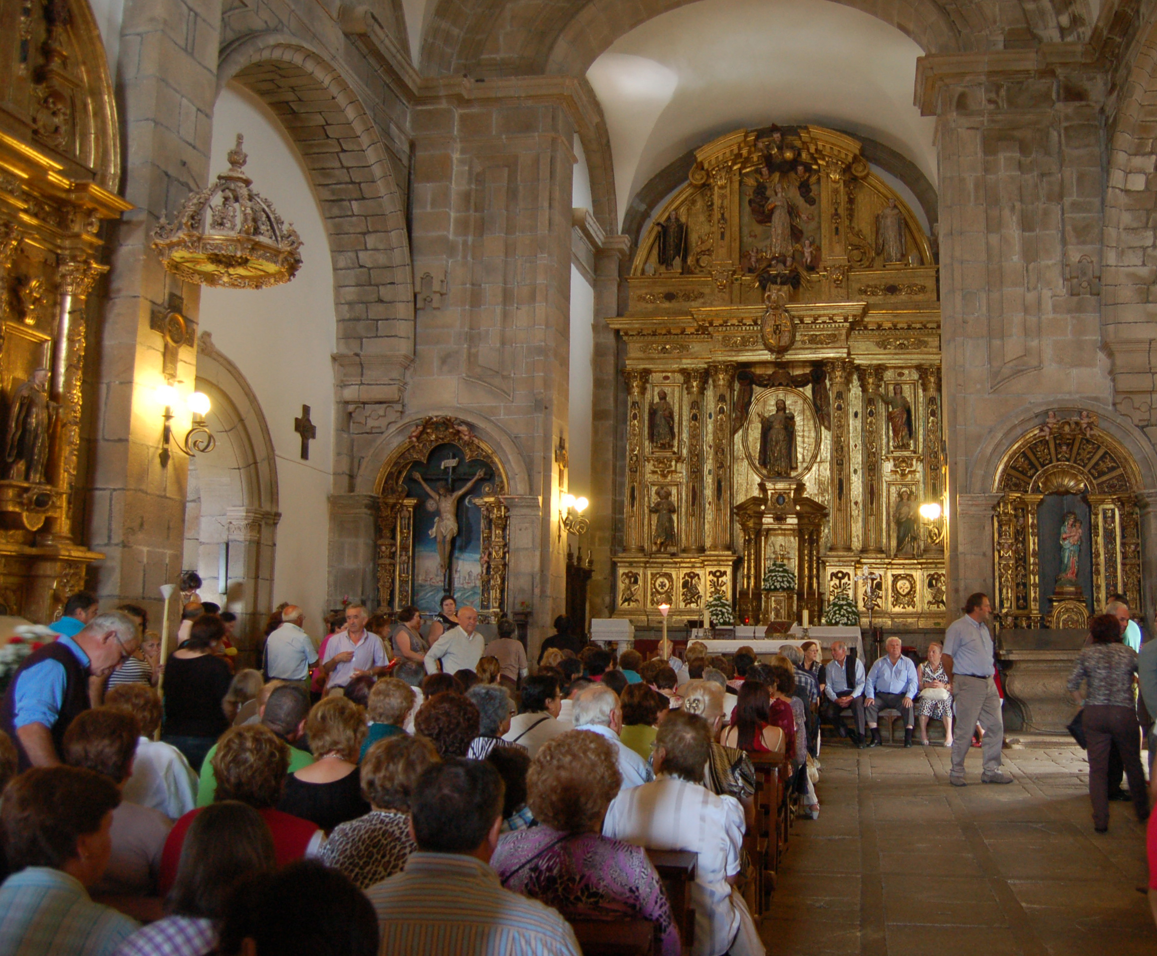 Interior do mosteiro de San Salvador de Lérez durante a romaría de San Benitiño, o gl:11 de xullo.